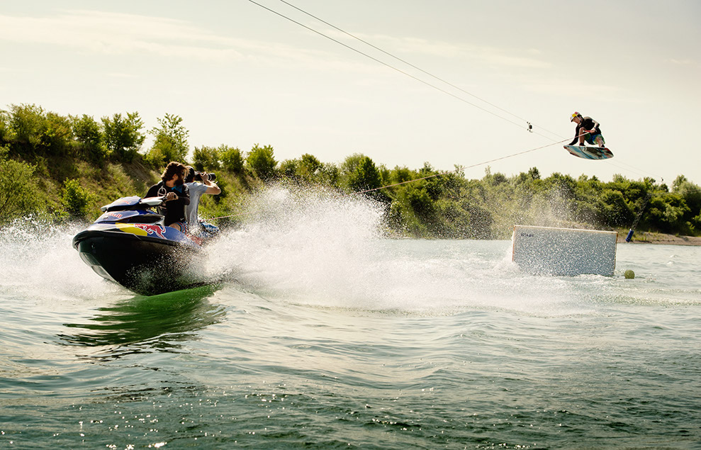 Freddy von Osten beim Wakeboarden